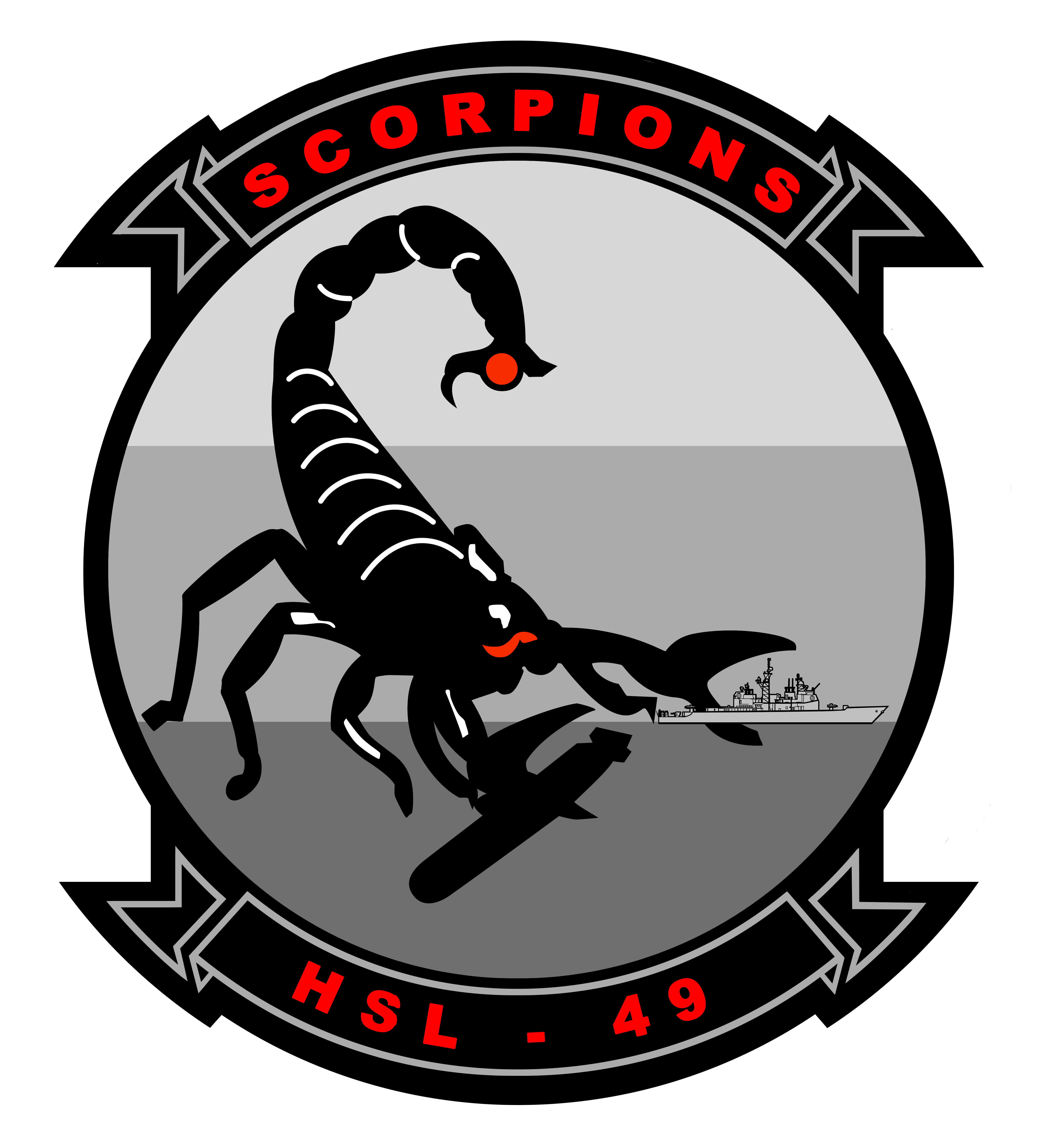 SquadronEmblem